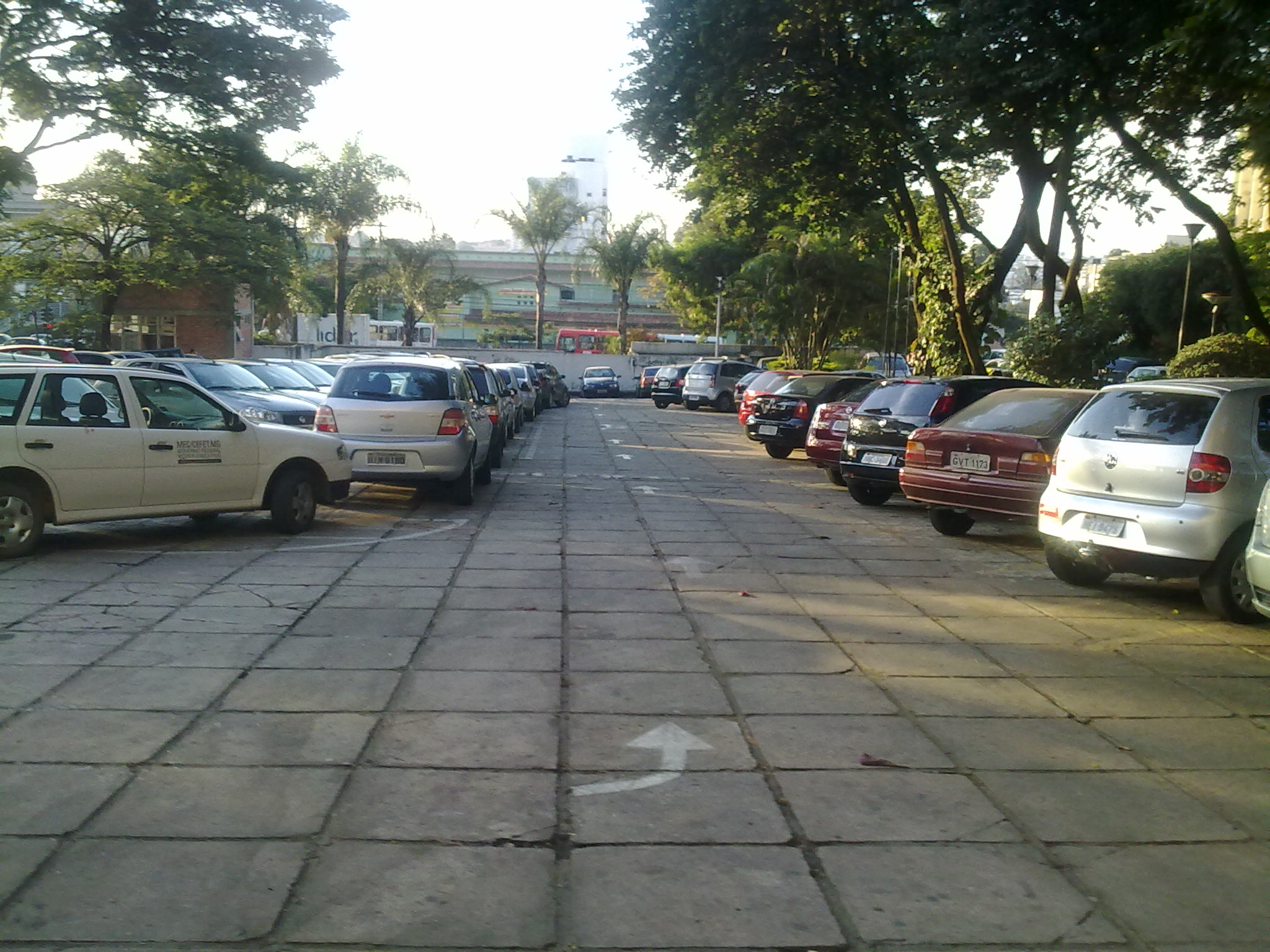 Estacionamento do campus I do Cefet-MG, em Belo Horizonte, Brasil.